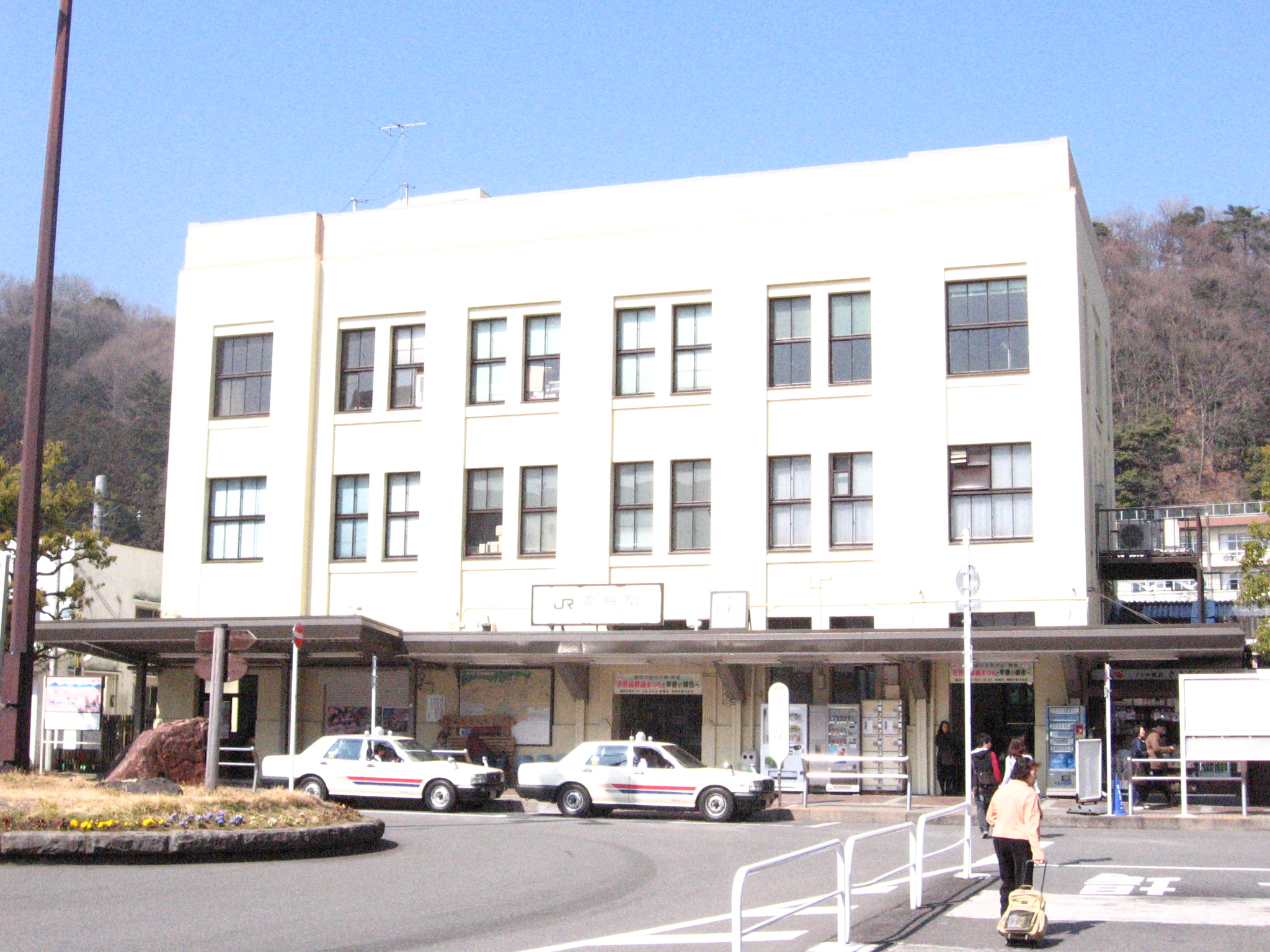 JR East-japan Ome-line Ome Station.